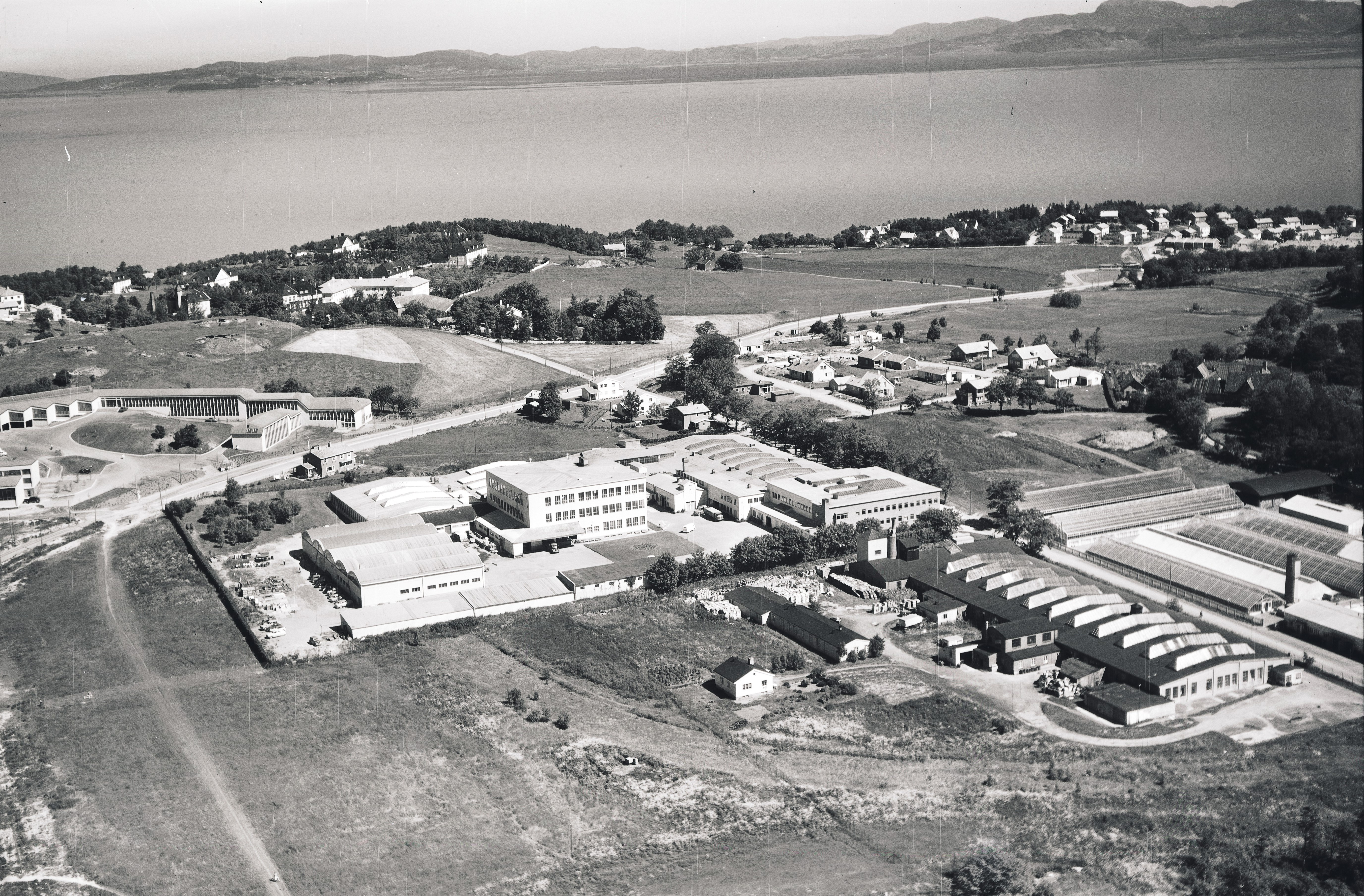 Nobø fabrikker på Lade i forgrunnen, og Ladesletta gartneri. Østmarkveien. Olav Engelbrektsons alle, Ringve skole. Østmarka psykiatriske sykehus og noe av bebyggelsen på Fagerheim.